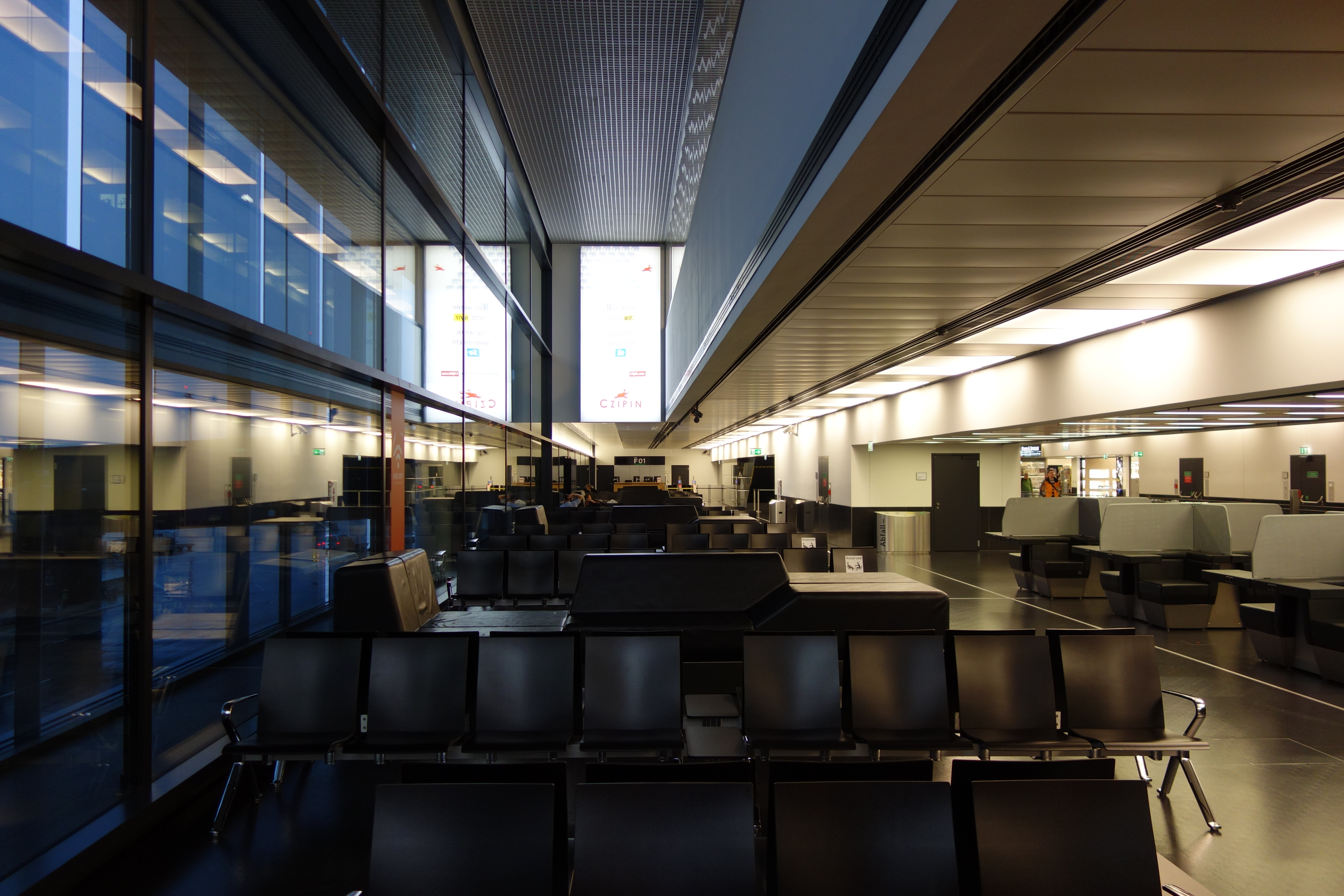 Der Wartebereich der Gates F01 und F03 am Flughafen Wien im Februar 2016.